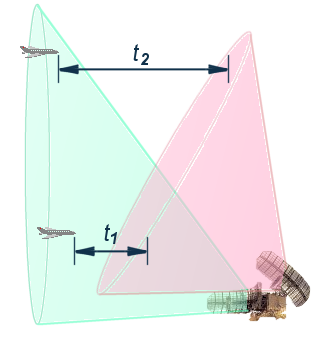 Prinzip der Höhenbestimmung mit einem V-beam: die untere Antennenebene hat ein senkrecht ausgerichtetes Diagramm. Beide übereinanderfliegende Flugzeuge werden gleichzeitig erfasst. Die obere Antennenebene ist um hier etwa 30° geschwenkt. Das tieffliegende Flugzeug wird eher erfasst, als das hochfliegende. Aus dem Zeitunterschied kann die jeweilige Flughöhe berechnet werden.